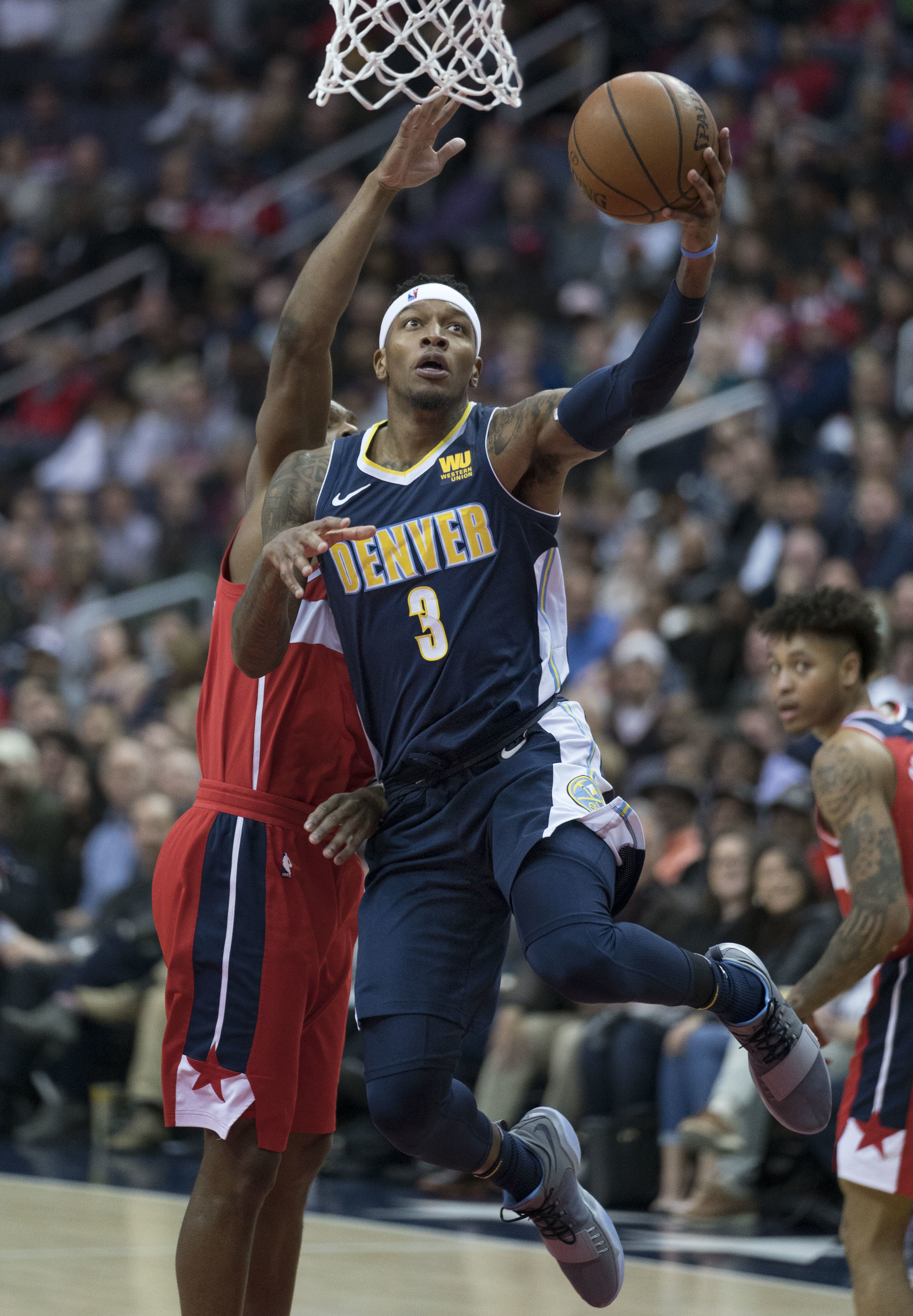 Nuggets at Wizards 3/23/18